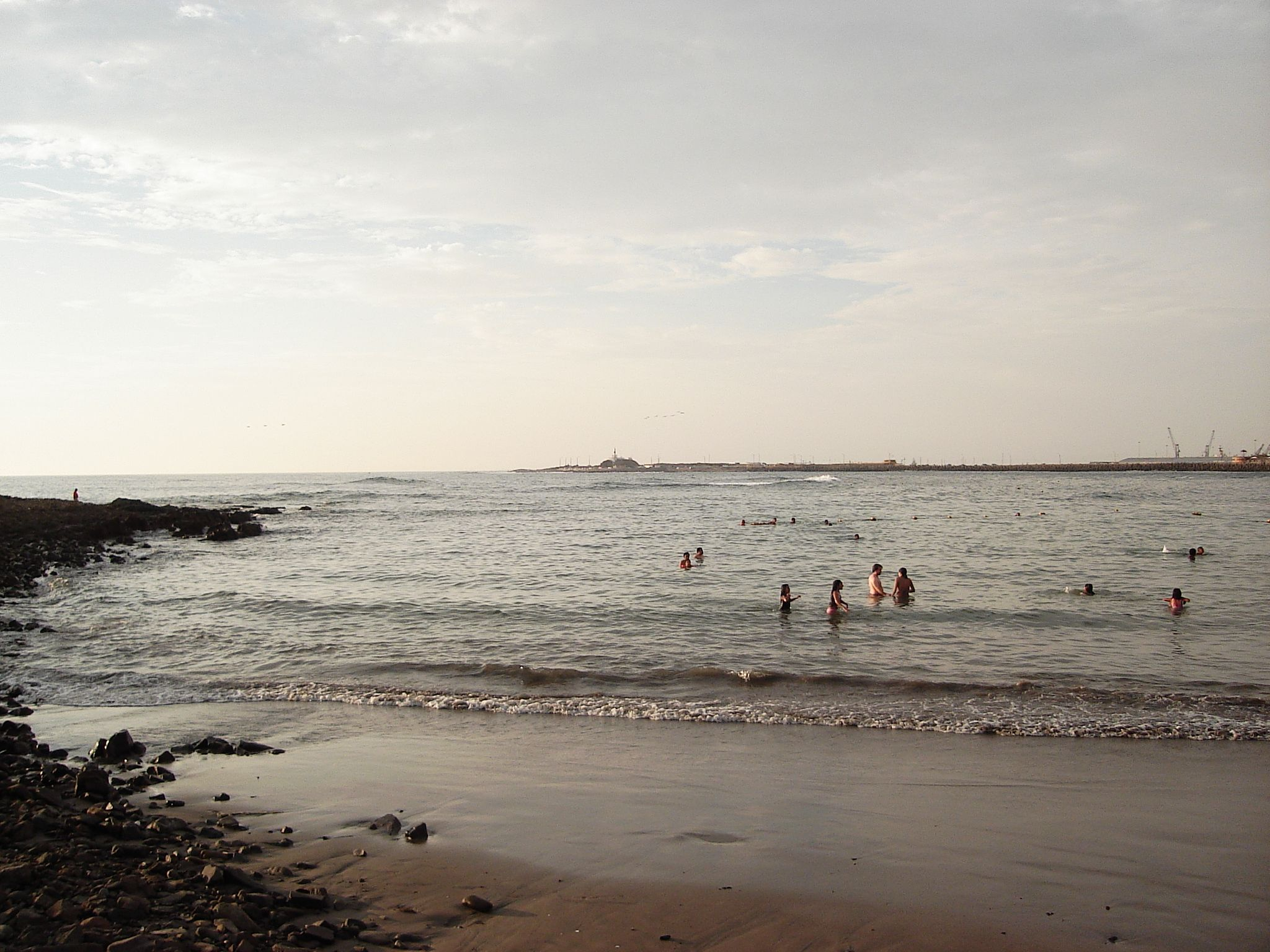 Foto tirada por mim, em Arica.